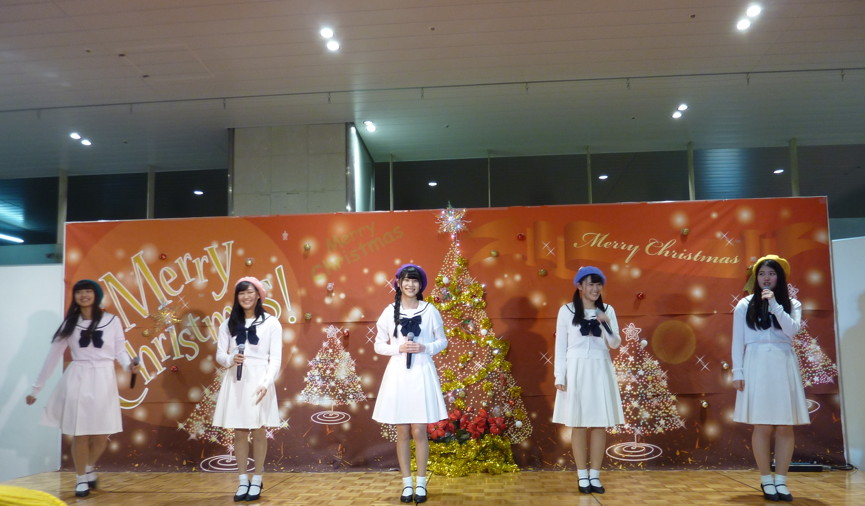 omiya station